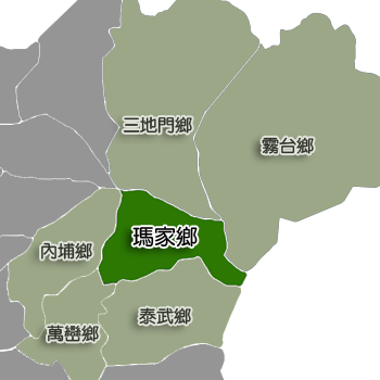 屏東縣瑪家鄉相對位置。